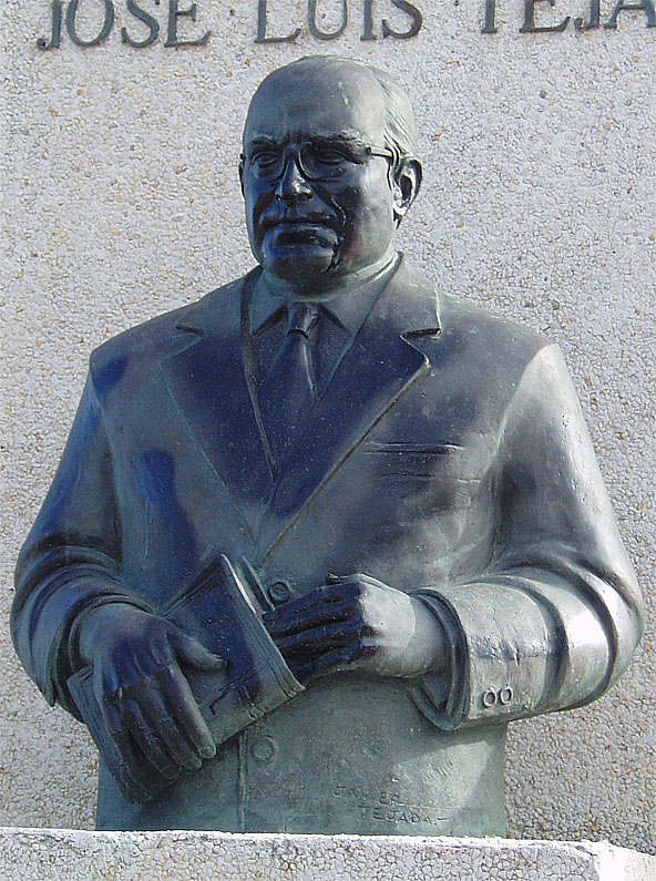 Busto del poeta andaluz José Luis Tejada, situado en su ciudad natal, El Puerto de Santa María, España.